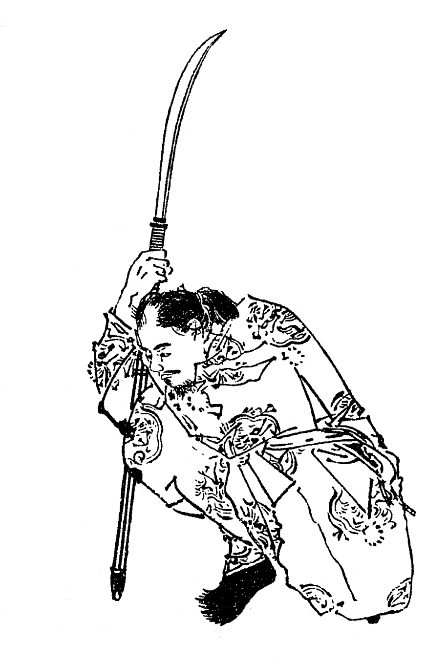 河野通信、平安時代末期 - 鎌倉時代初期の武将。／江戸時代『前賢故実』より。画：菊池容斎